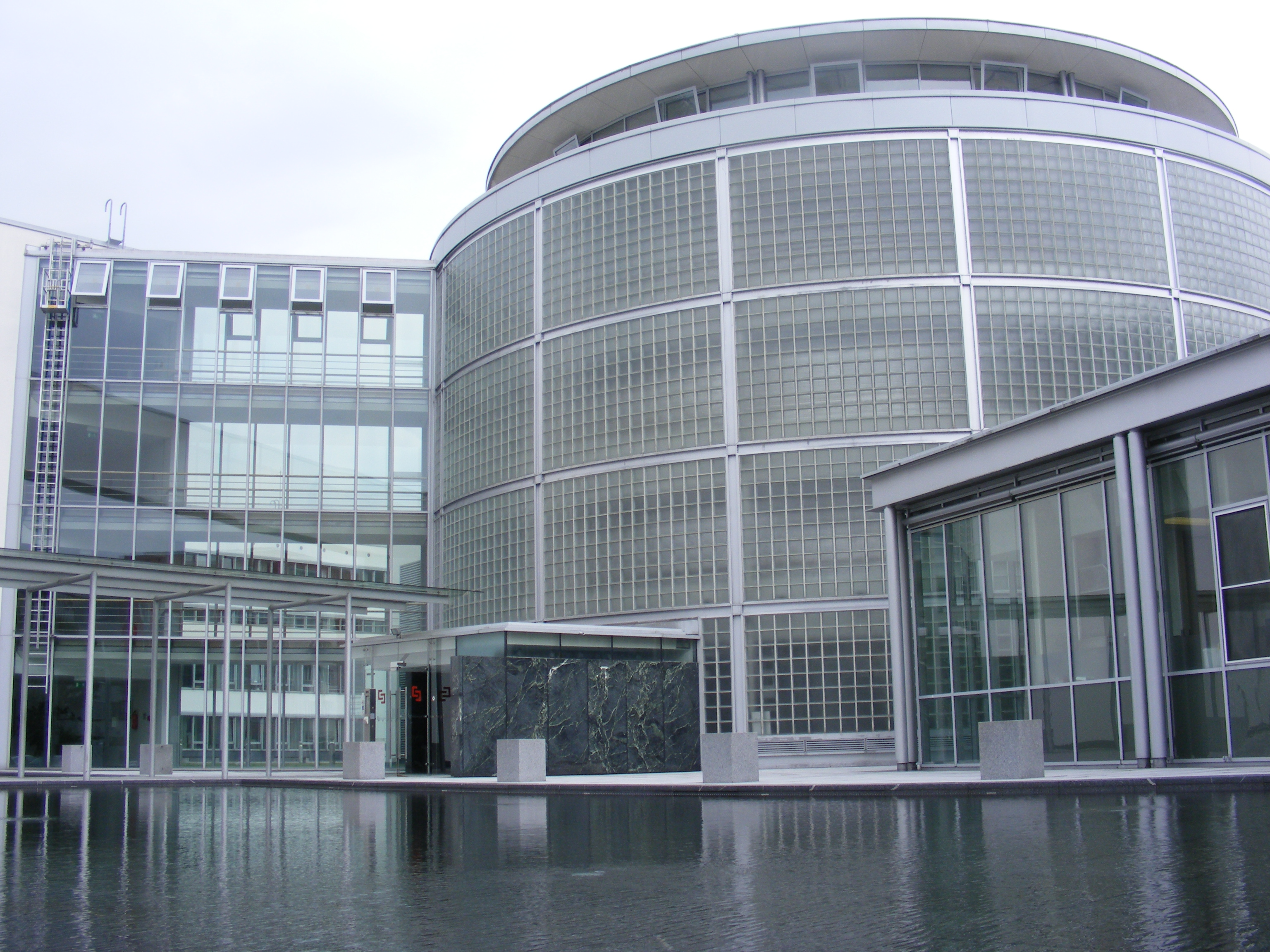 Verwaltungsgebäude der Salzburg AG, Salzburg-Schallmoos